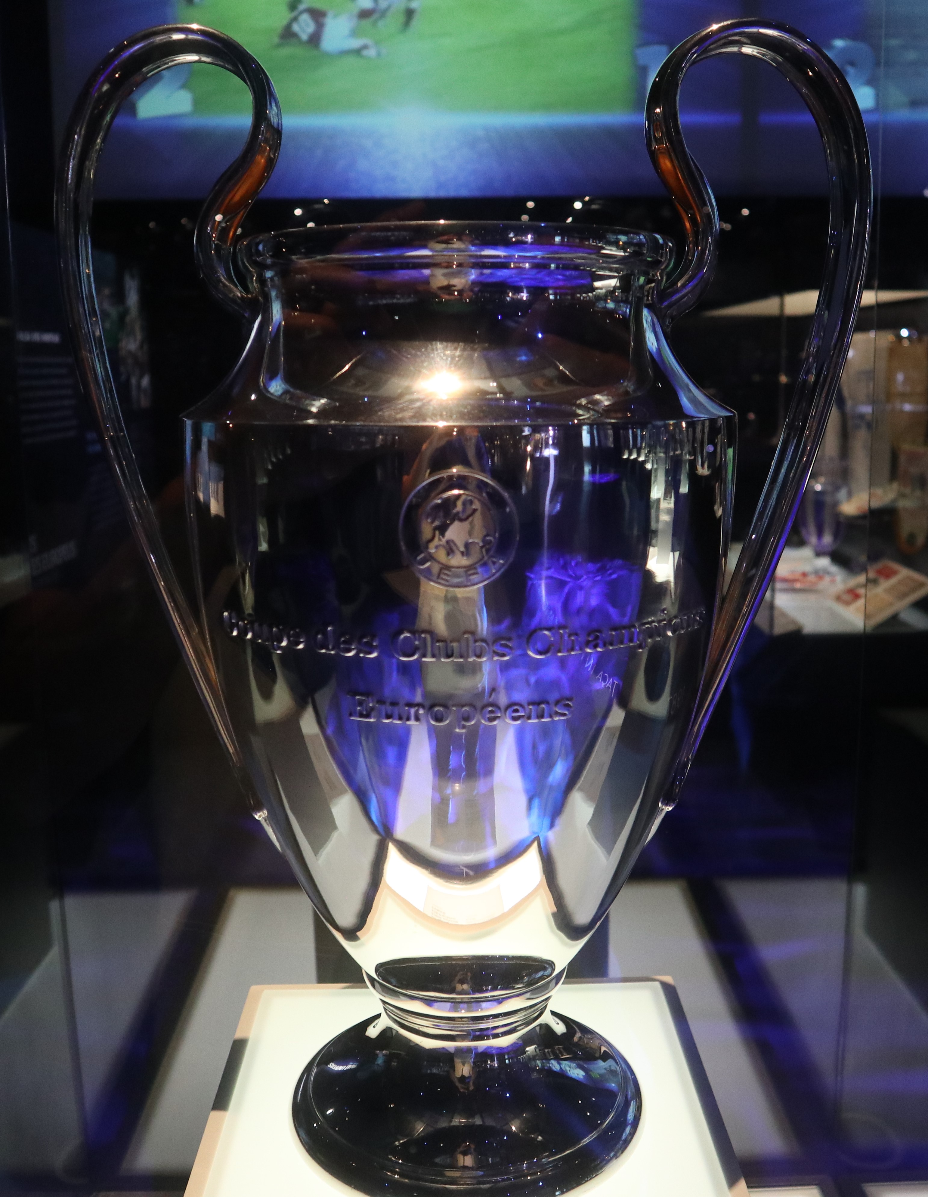 Taça da Liga dos Campeões ganha pelo FC Porto em 2003/2004 contra o Monaco